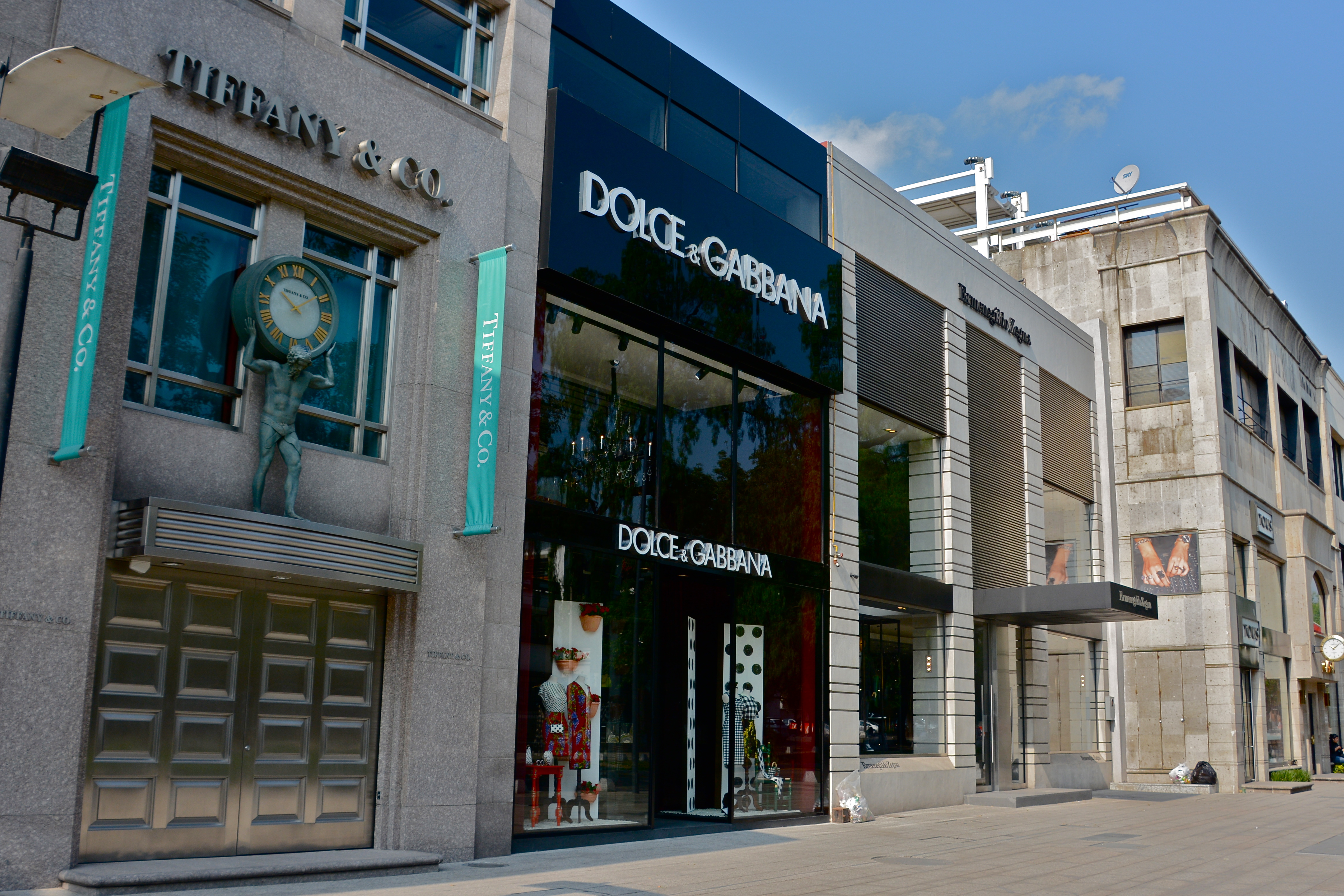 Polanco